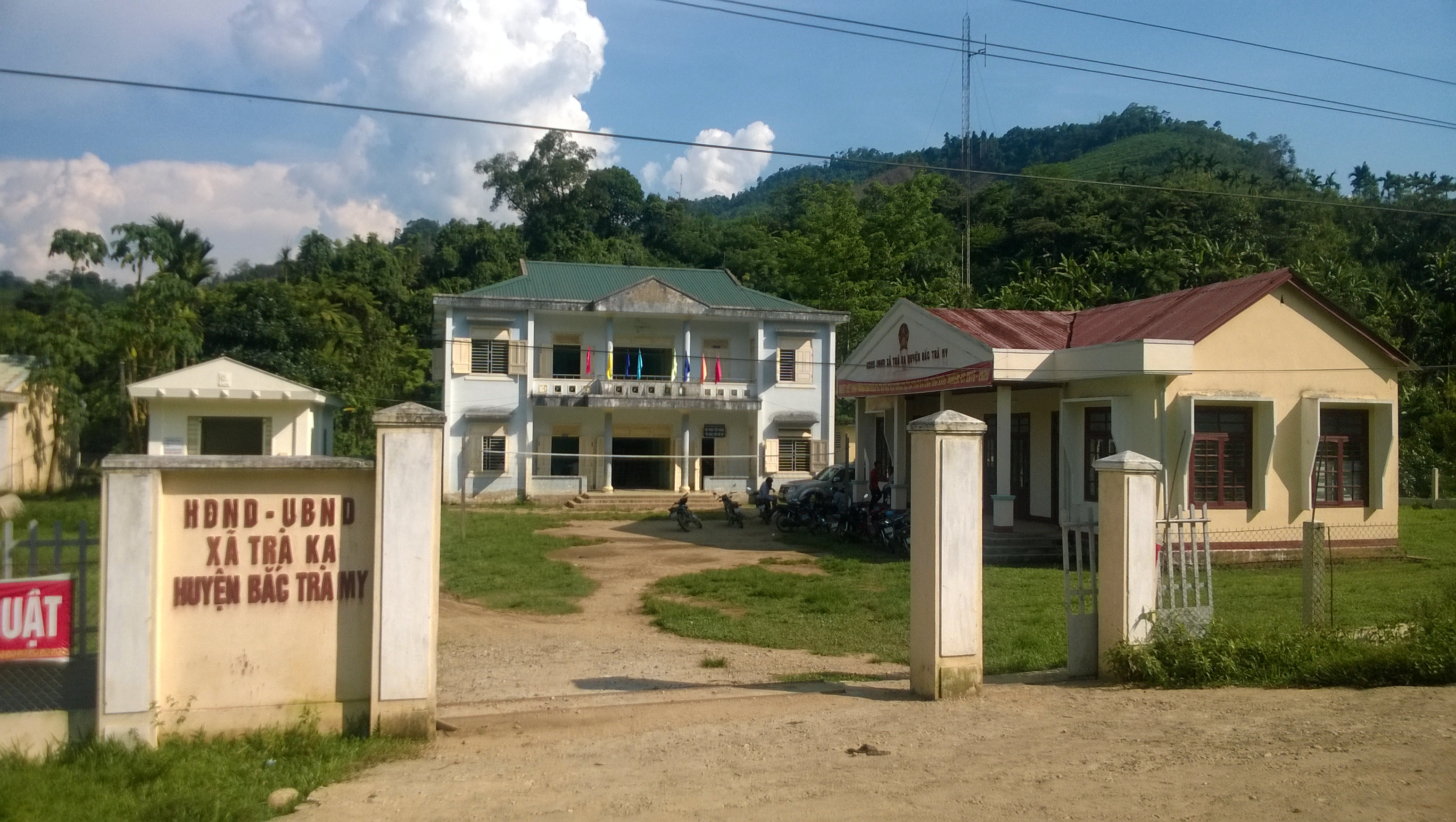 UBND xã Trà Ka, Bắc Trà My, Quảng Nam